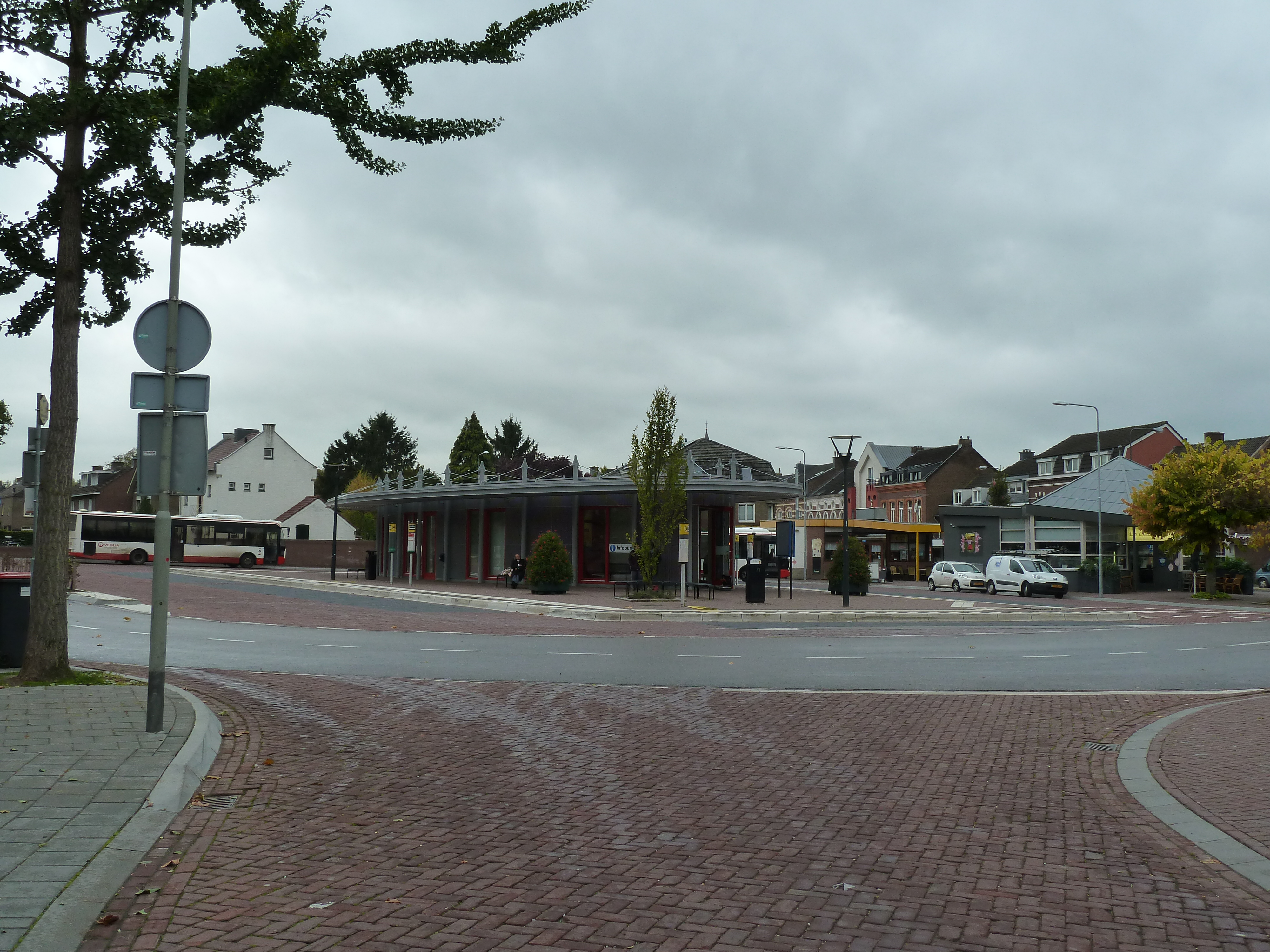 Busstation + Burgemeester Teheuxweg: locatie verdwenen tramstation op de tramlijn Vaals-Maastricht, Gulpen, Limburg, Nederland